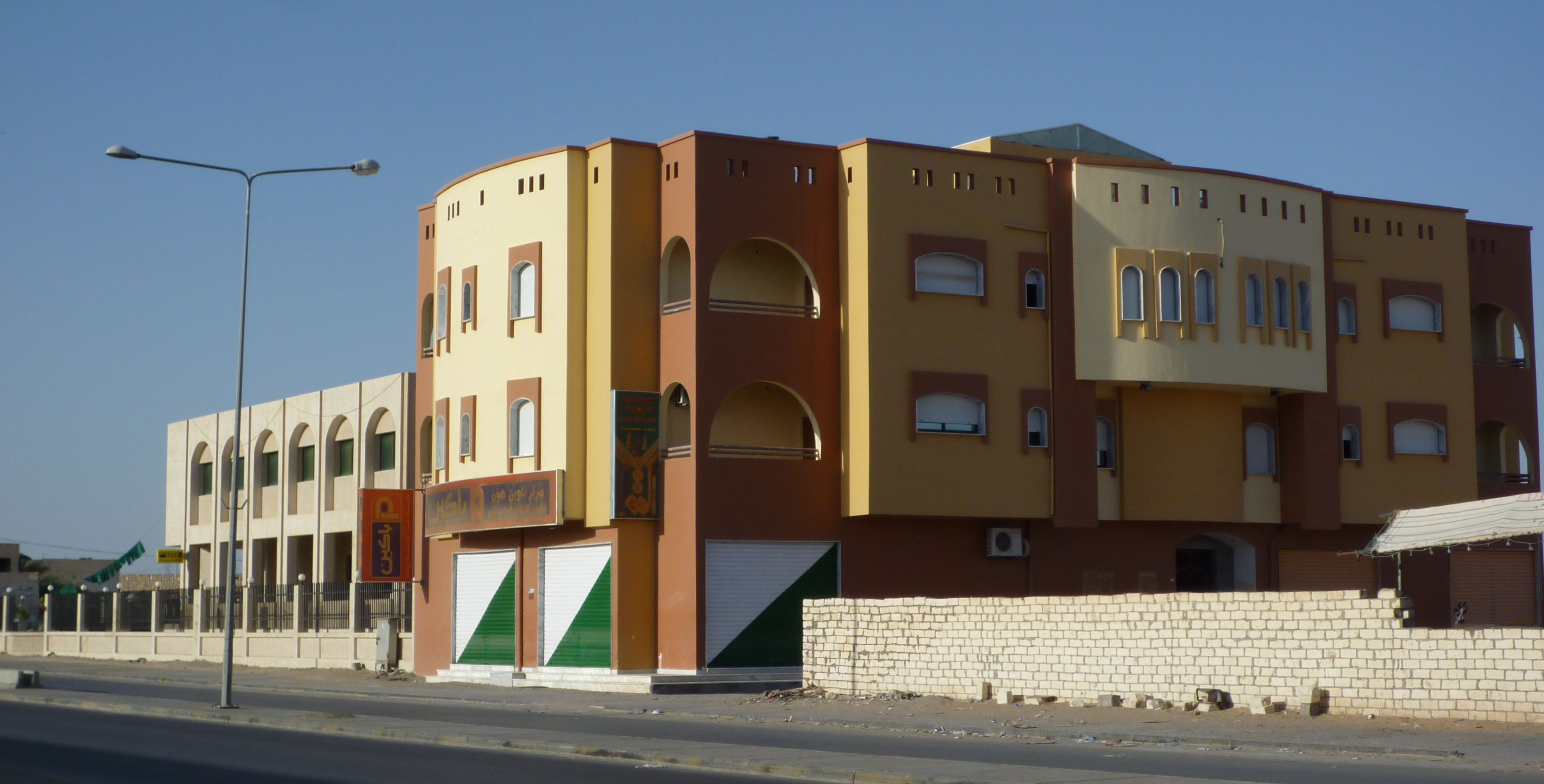 Hun - Wohnhaus